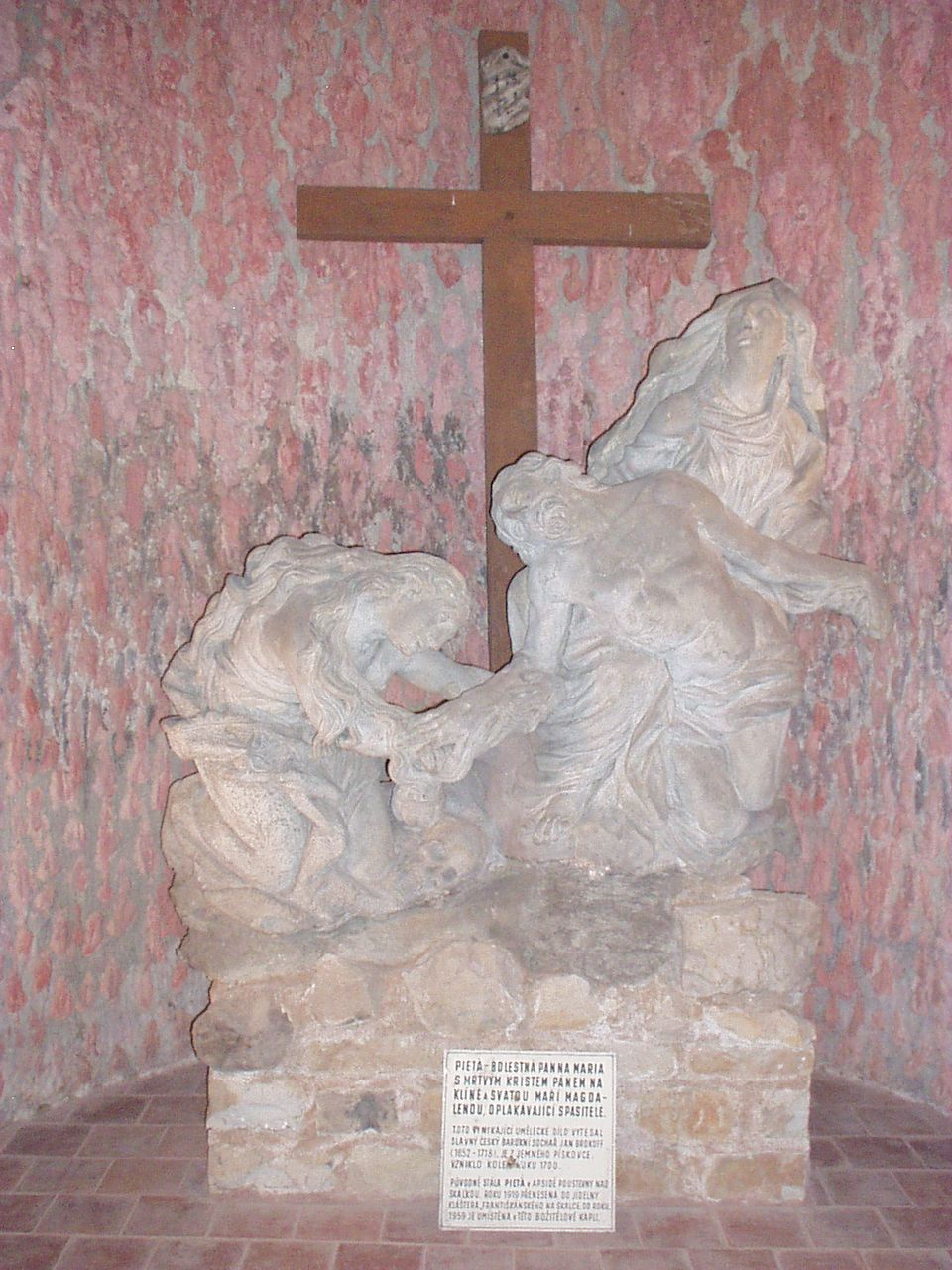 poustevna na Skalce - Pieta 2